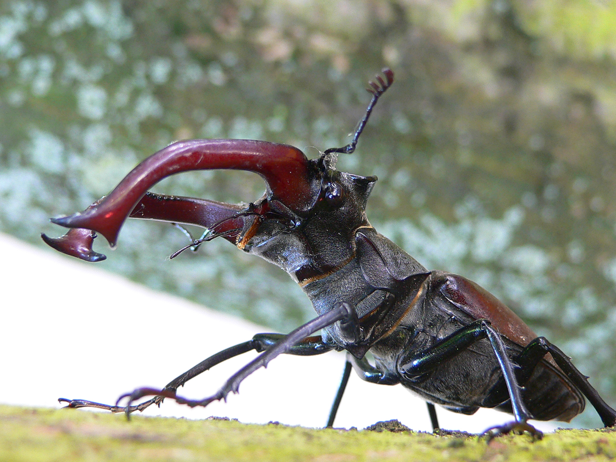 Hirschkäfer male